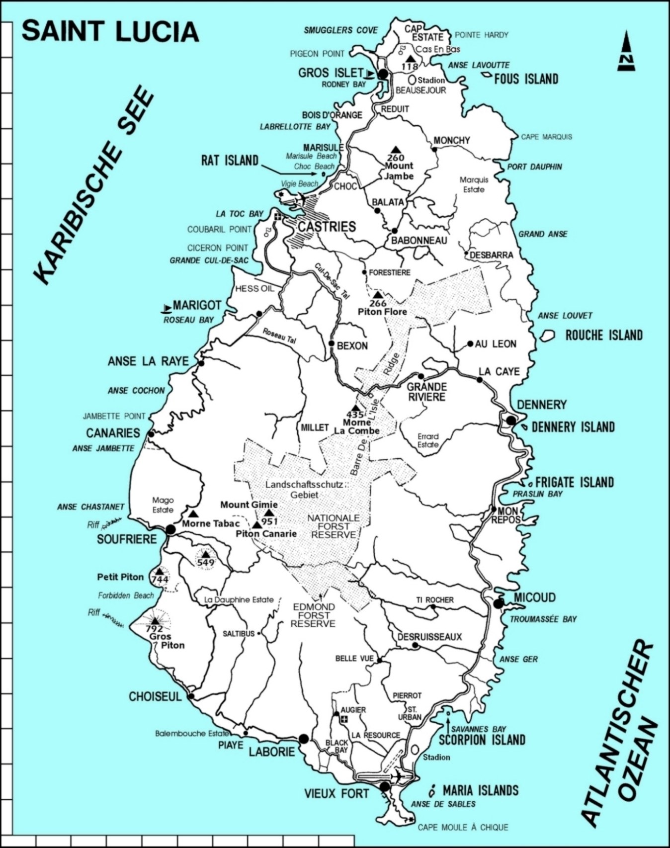 Karte von Saint Lucia